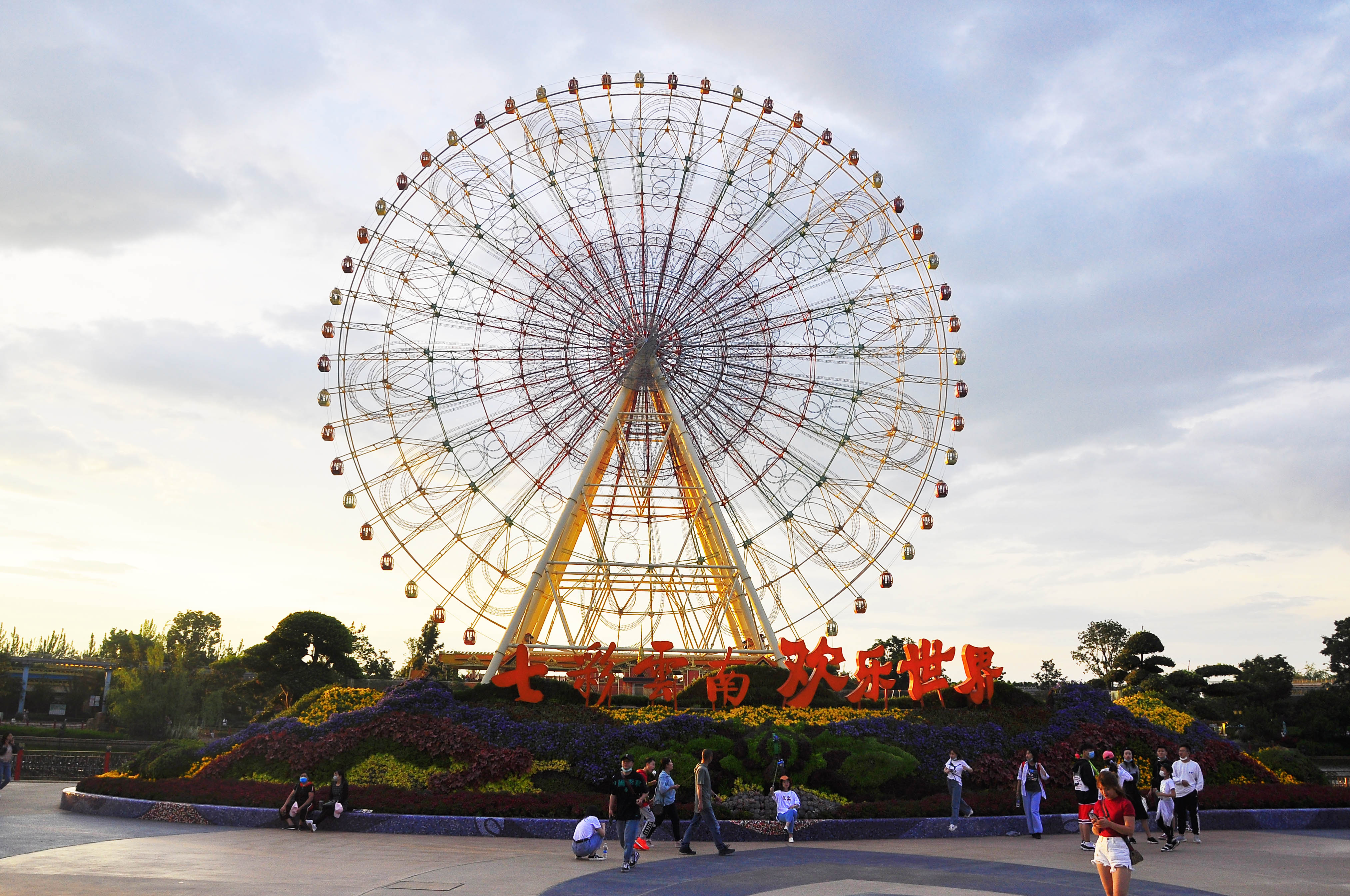 位于云南省昆明市晋宁区晋城镇的七彩云南•欢乐世界主题乐园中的摩天轮-滇池之眼。